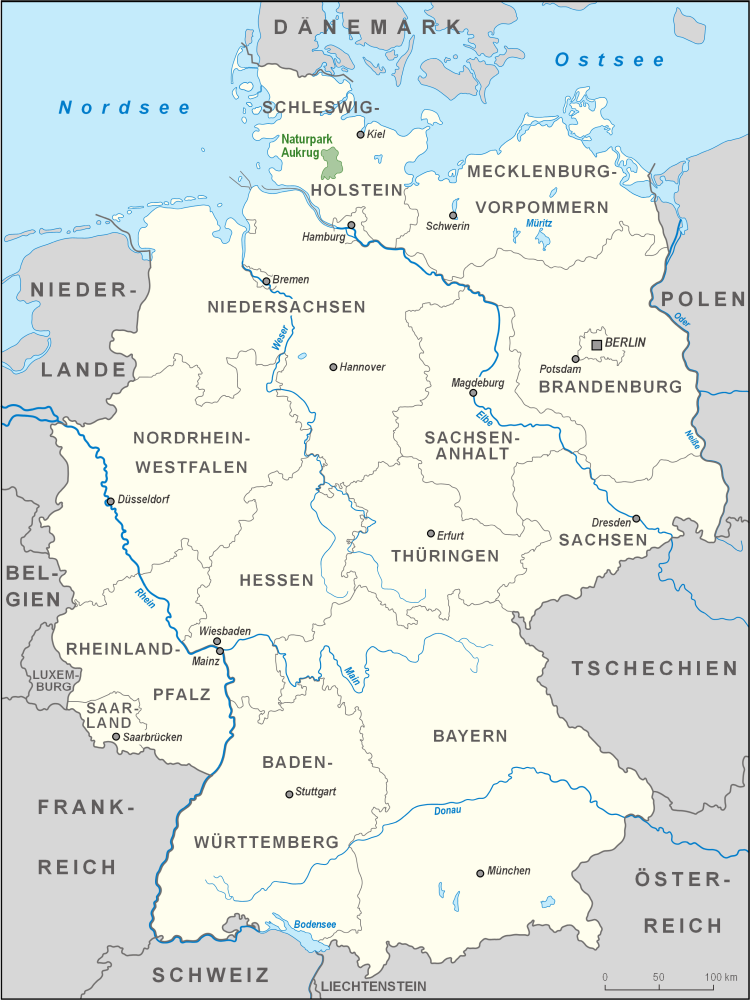 Karte des Naturparks Aukrug in Deutschland